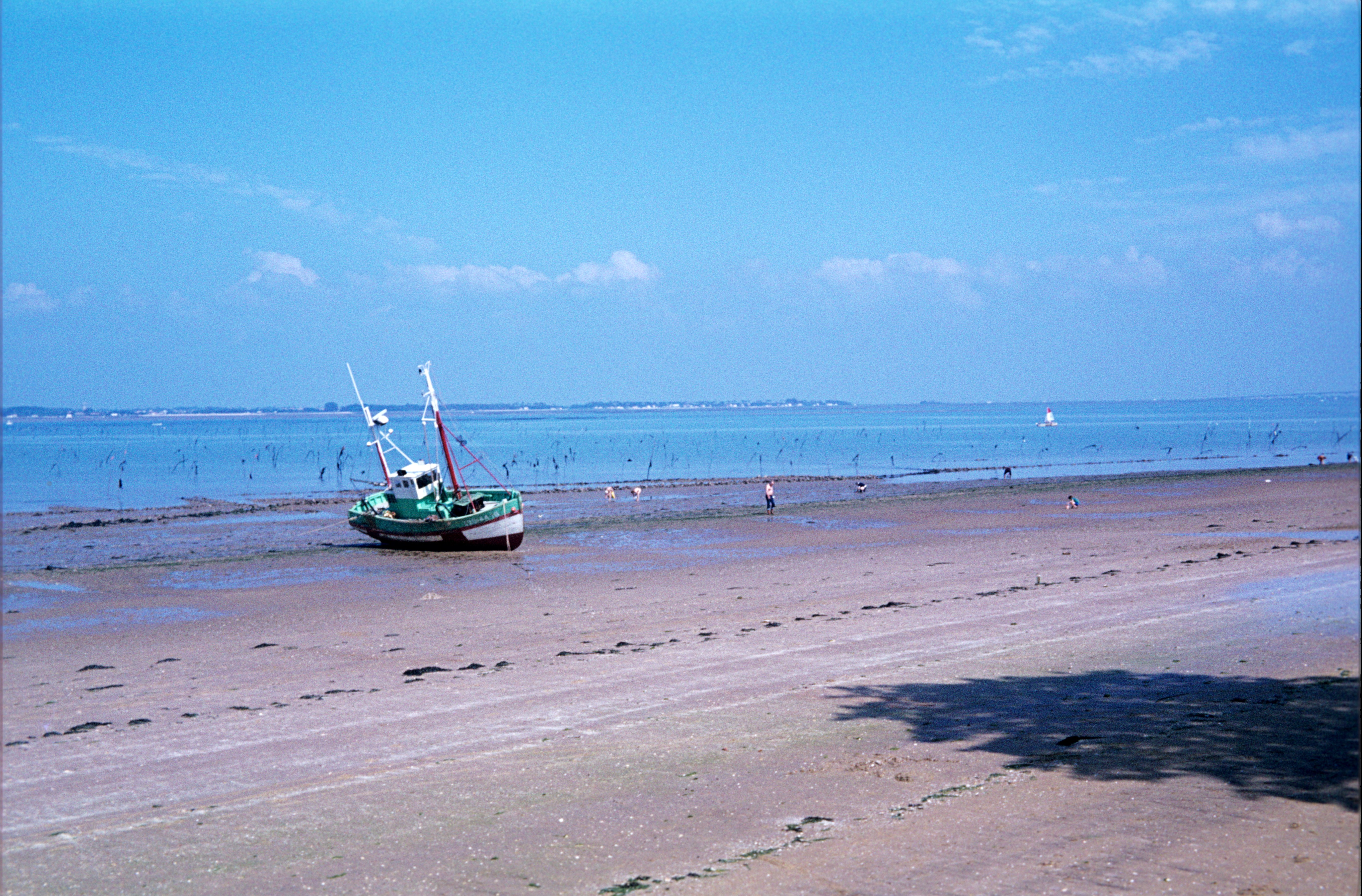 Un petit chalutier de pêche côtière, à chalutage latéral (deux potences à tribord), échoué à marée basse sur le rivage. Près du bateau, sur la droite, des personnes ramassent des huitres sauvages. Saint-Trojan-les-Bains (Île d' Oléron), Charente Maritime, France.